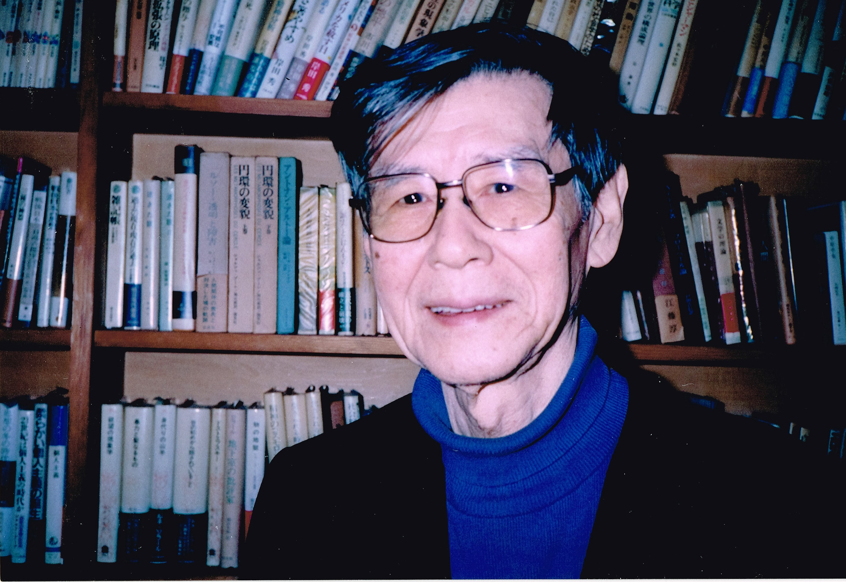 作田啓一（2003年、京都の自宅にて）